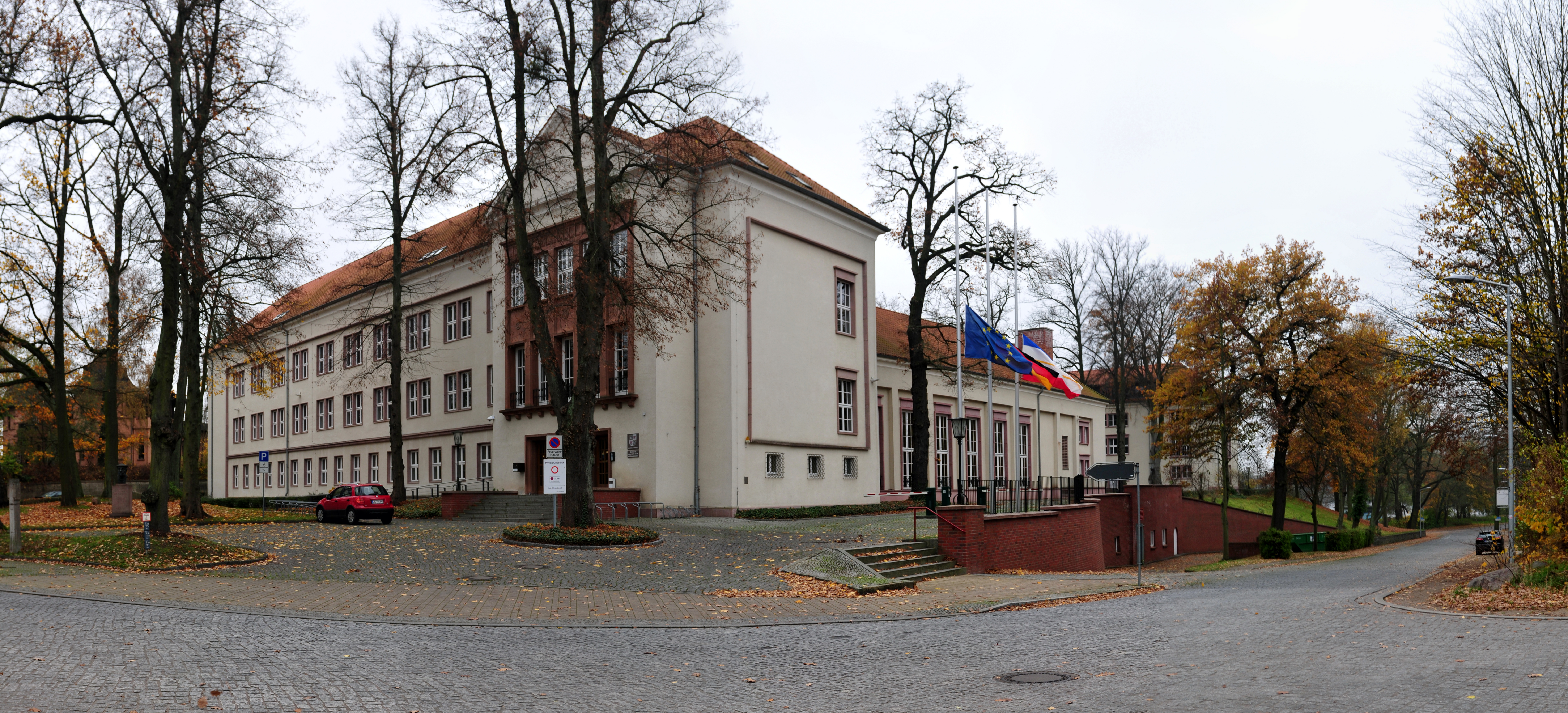 Schwerin